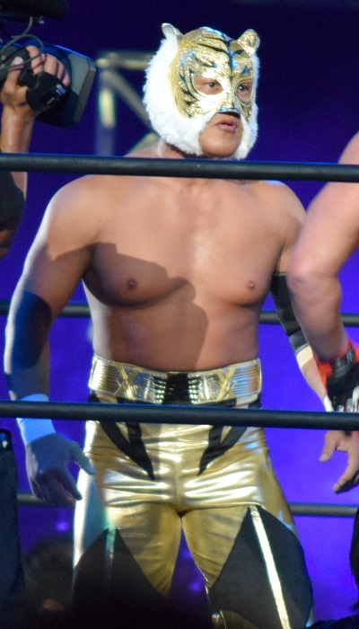 2015年8月1日 大阪府立体育会館 「G1 CLIMAX 25」 4代目タイガーマスク